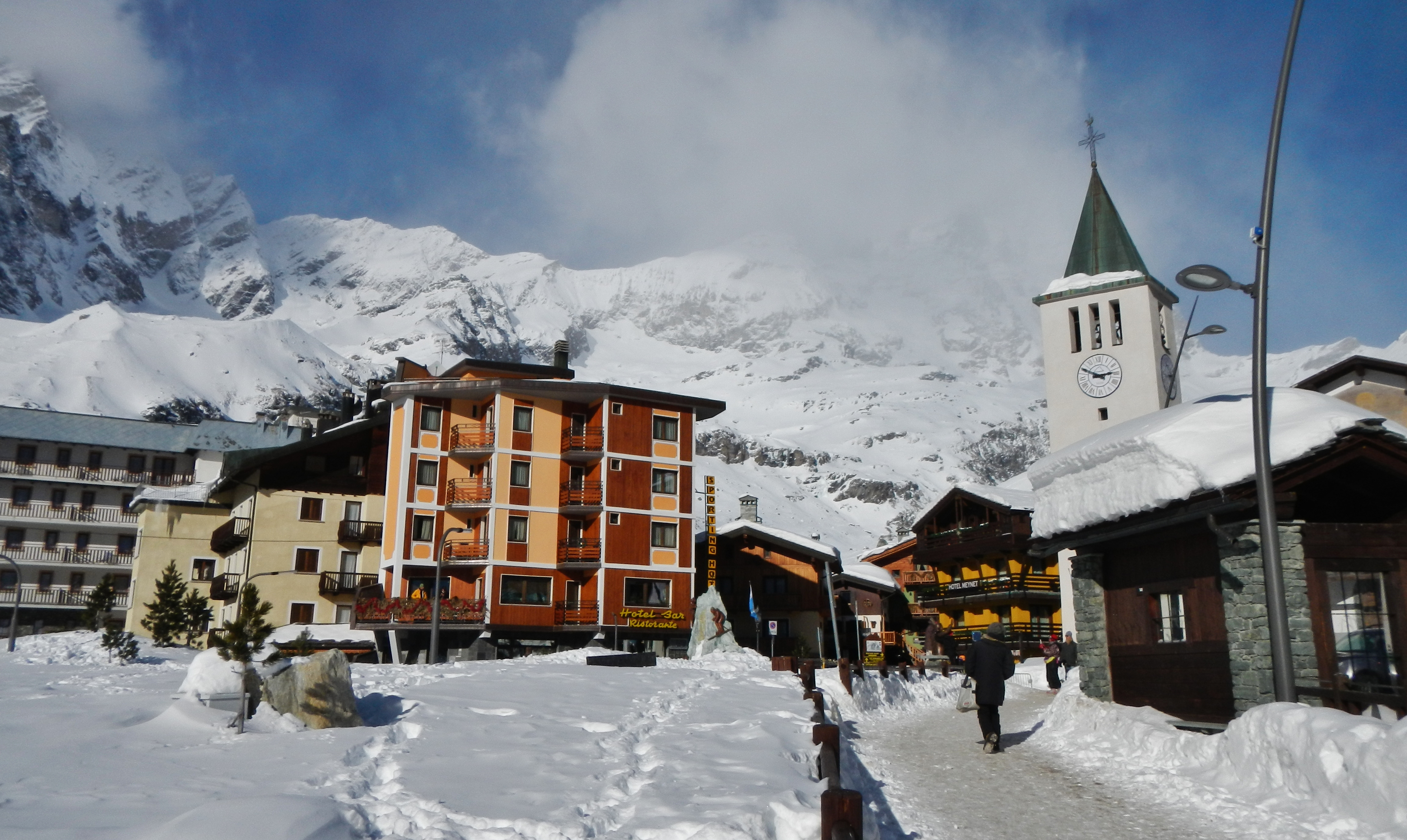 Breuil-Cervinia